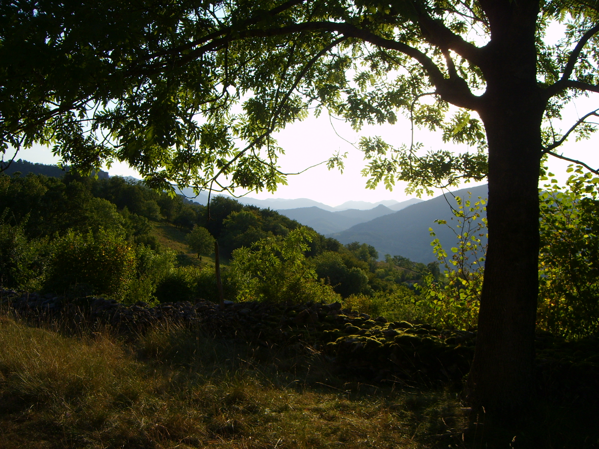 Saint-Girons, les sommets de la Bellongue vus depuis la Pale.